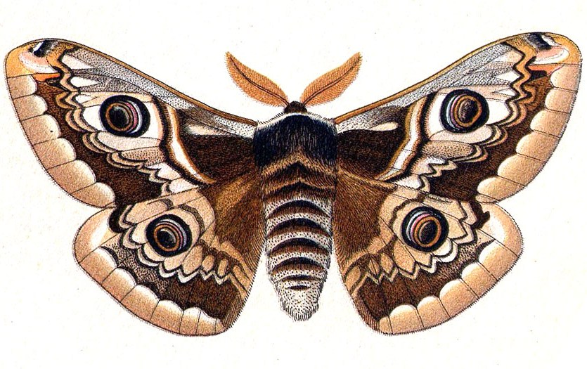 Saturnia spini